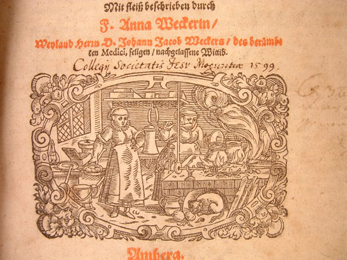 Mainzer Exemplar des ersten von einer Frau verfassten deutschsprachigen Kochbuchs. Die Baseler Arztgattin Anna Wecker hatte "Ein koestlich Kochbuch new von allerhand Speisen ..." 1597 geschrieben und dabei besonders die Ernährungs-Bedürfnisse von Kranken und Kindern berücksichtigt. Die Stadtbibliothek besitzt das in vielen Auflagen erschienene Werk in der 2. Auflage Amberg 1598. Die Mainzer Jesuitenniederlassung hatte den Druck bereits 1599 für ihre Bibliothek erworben